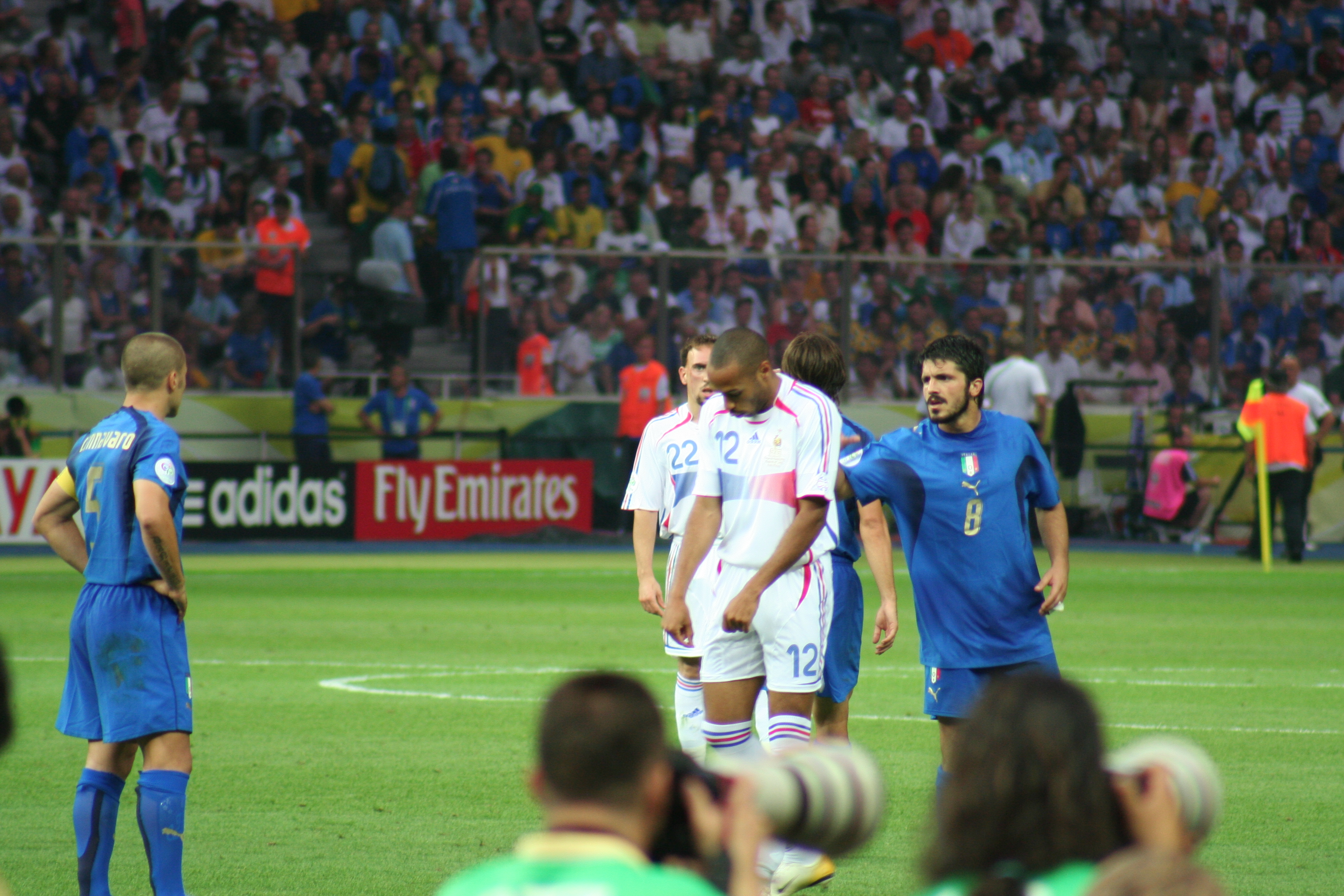 Henry amuses himself